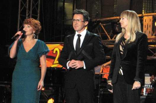 Koncert inaugurujący jesienną ramówkę TVP (Warszawa, ul. Woronicza): na scenie Katarzyna Zielińska, Maciej Kurzajewski i Marzena Rogalska